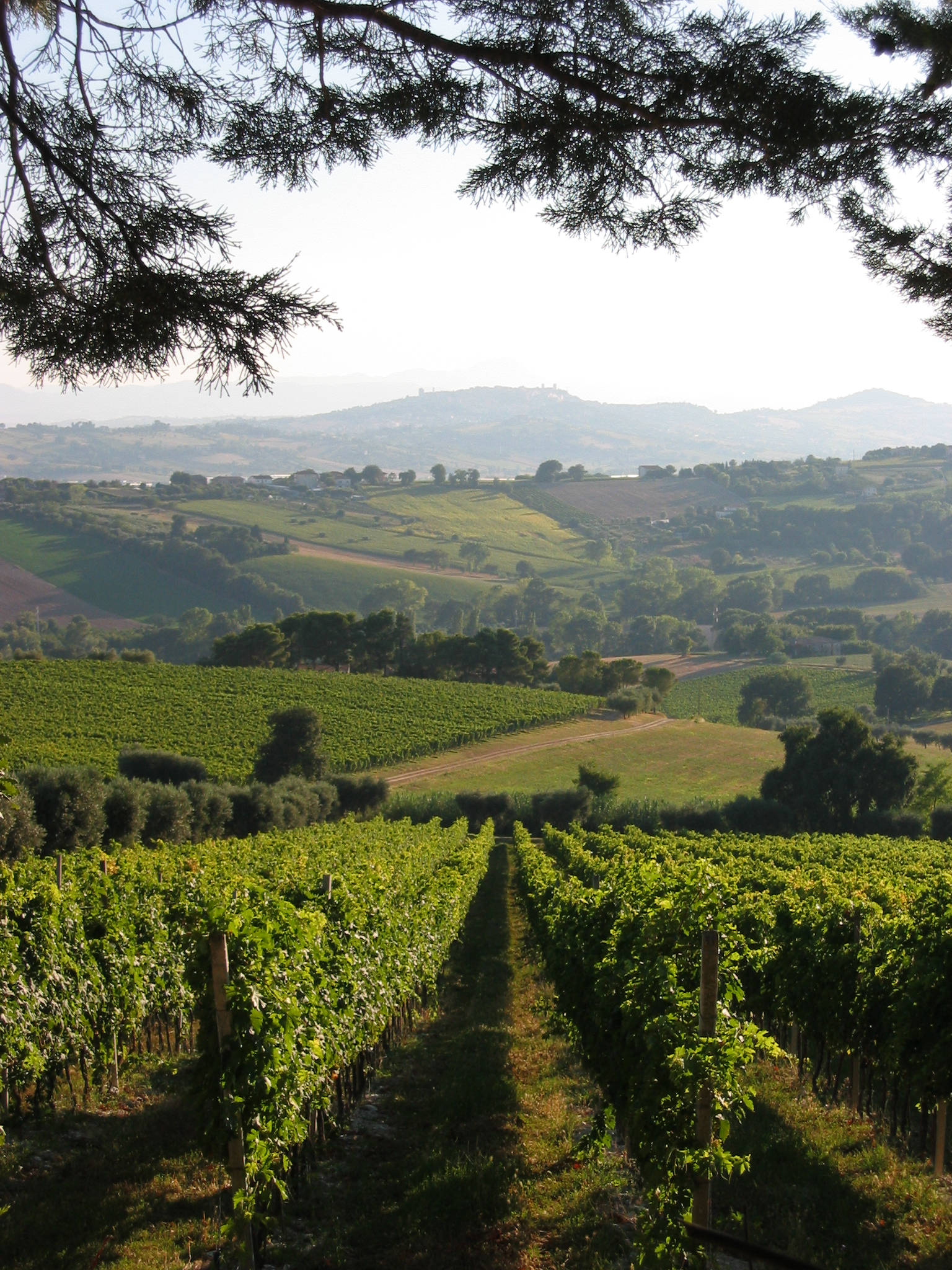 Vigneto su monte Colombo, sullo sfondo Osimo, lungo l'itinerario Anello della Pecorara del Parco regionale del Conero